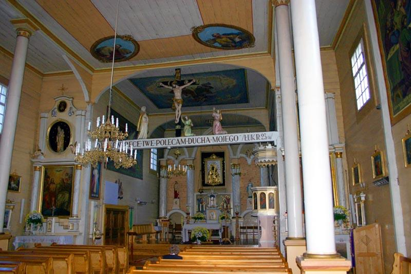 Warszawice Church in Poland